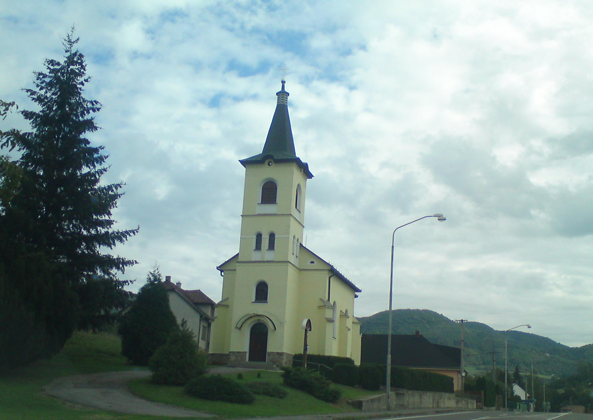 Kostol v obci Jalovec (PD)